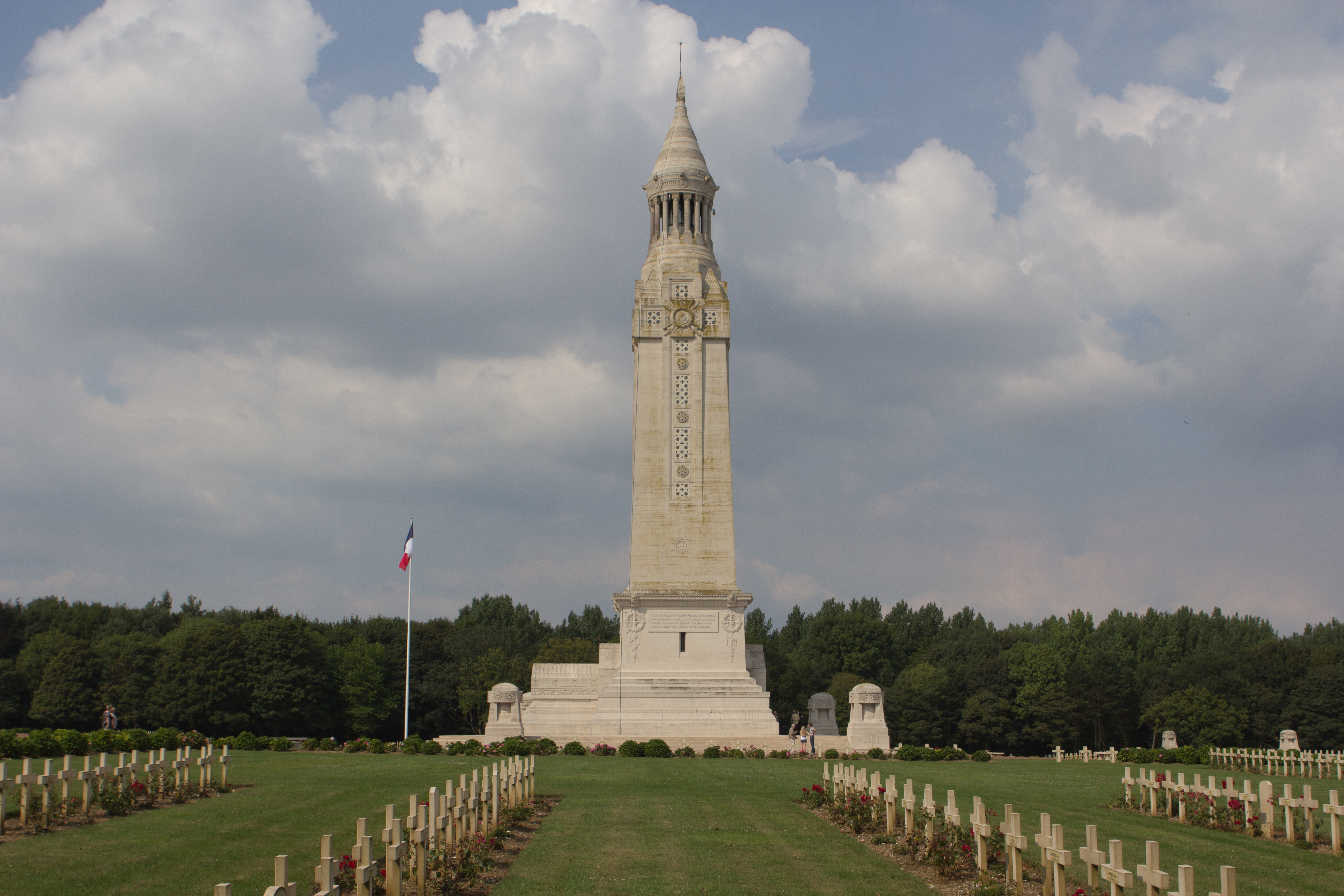 Nécropole nationale de Notre-Dame-de-Lorette / Ablain-Saint-Nazaire, Pas-de-Calais, France